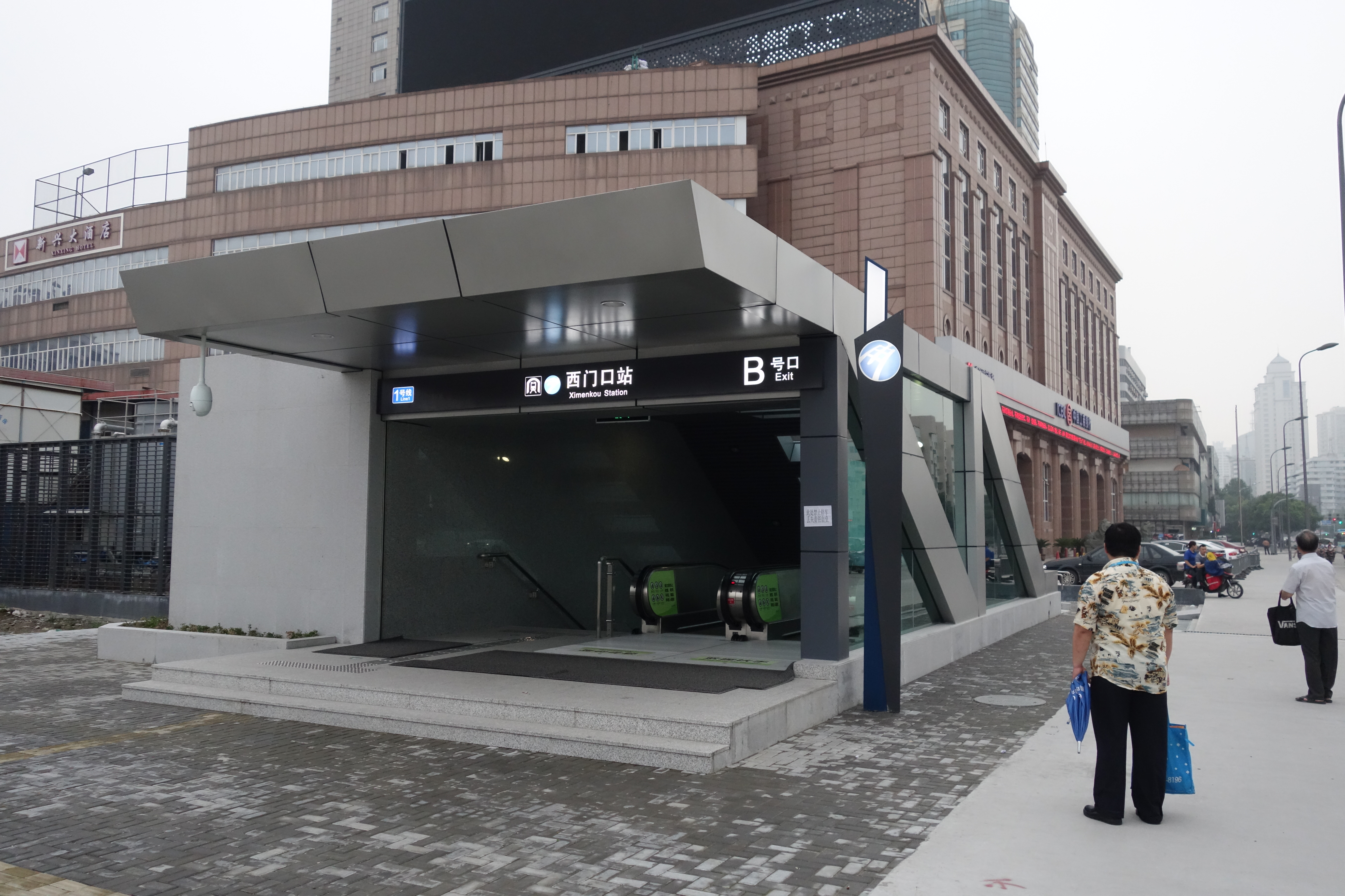 西门口站B出入口